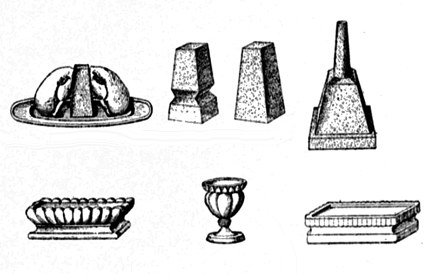 croutons à poularde chez Prosper Montagné